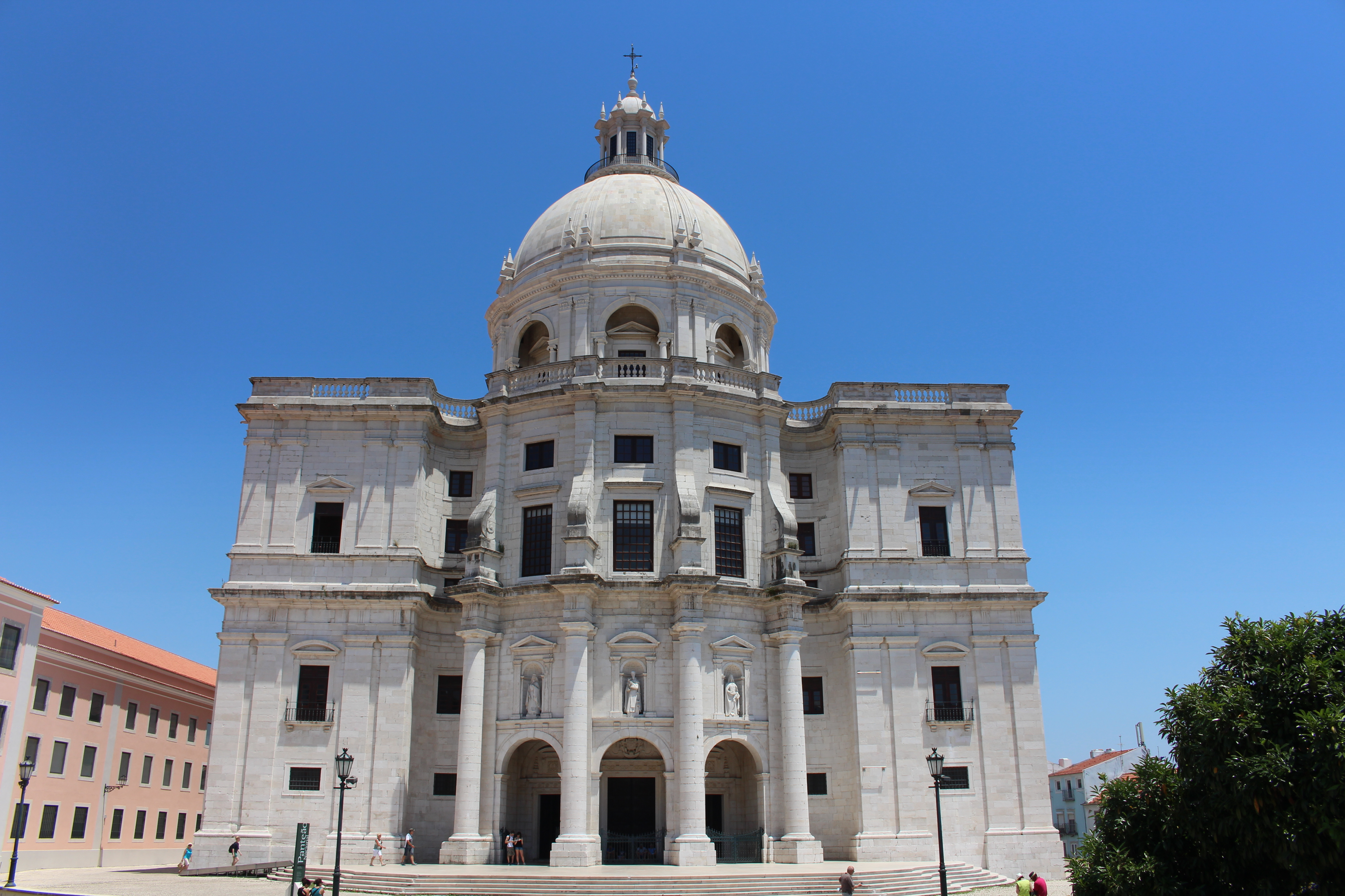 Panteao Nacional